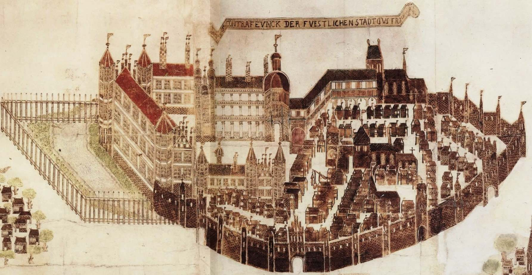 Castle in Guestrow, Mecklenburg.